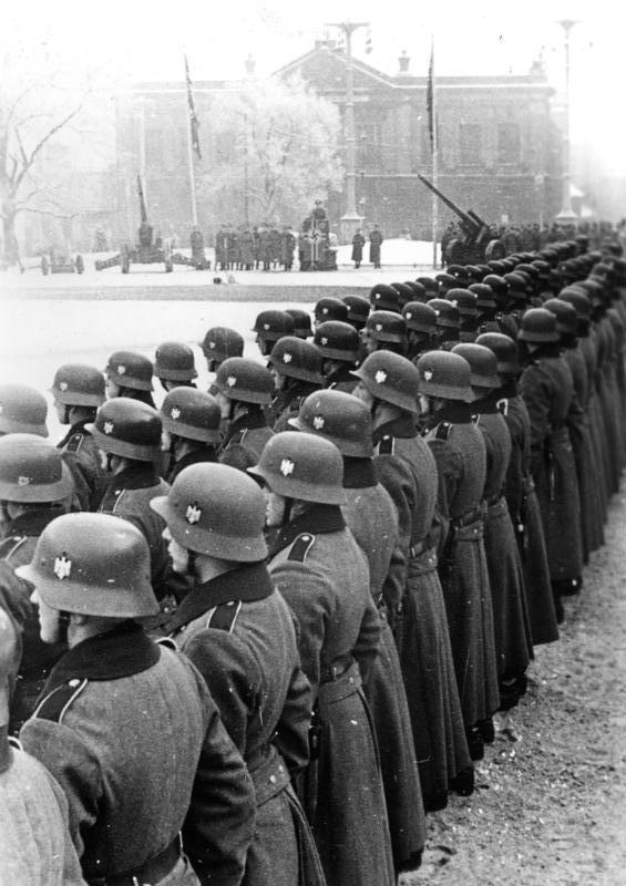 Posen, Vereidigung von Rekruten Auf dem mit den Fahnen Grossdeutschlands geschmückten Wilhelmsplatz in Posen fand in Anwesenheit des Kommandierenden Generals und Befehlshabers sowie des Reichsstatthalters die erste Vereidigung der Rekruten des Heeres des Standorts Posen statt. In seiner Rede an die jungen Soldaten betonte der General, dass bei allen vom jüngsten Rekrut bis zum obersten Führer der Glaube an den Sieg unserer gerechten Sache unerschütterlich ist. Unser Bild zeigt eine Teilübersicht während der Feier. Scherl Bilderdienst, Berlin 8.1.40.